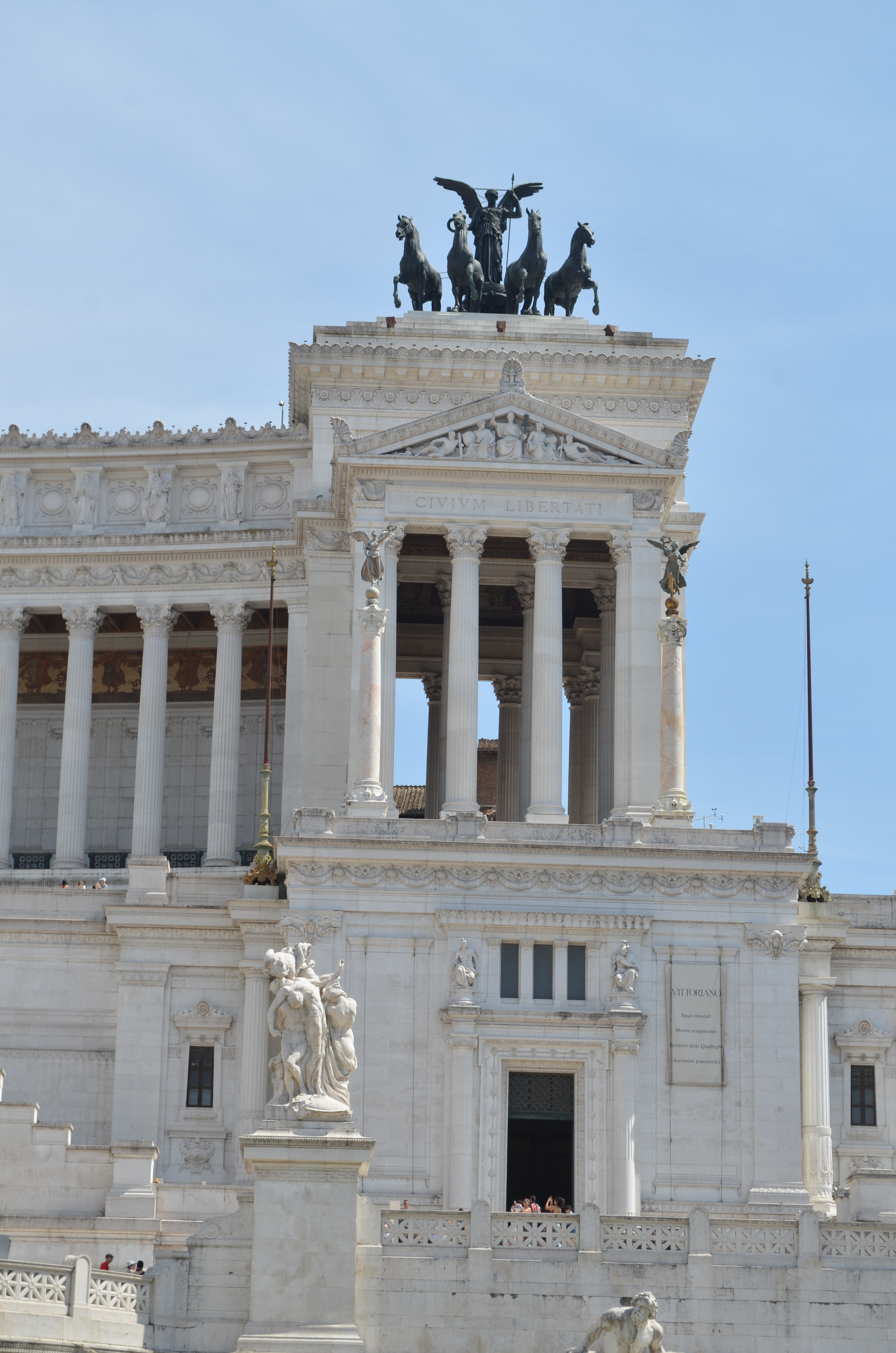 Altare della Patria